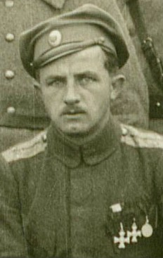 Václav Šidlík (1884-1952)